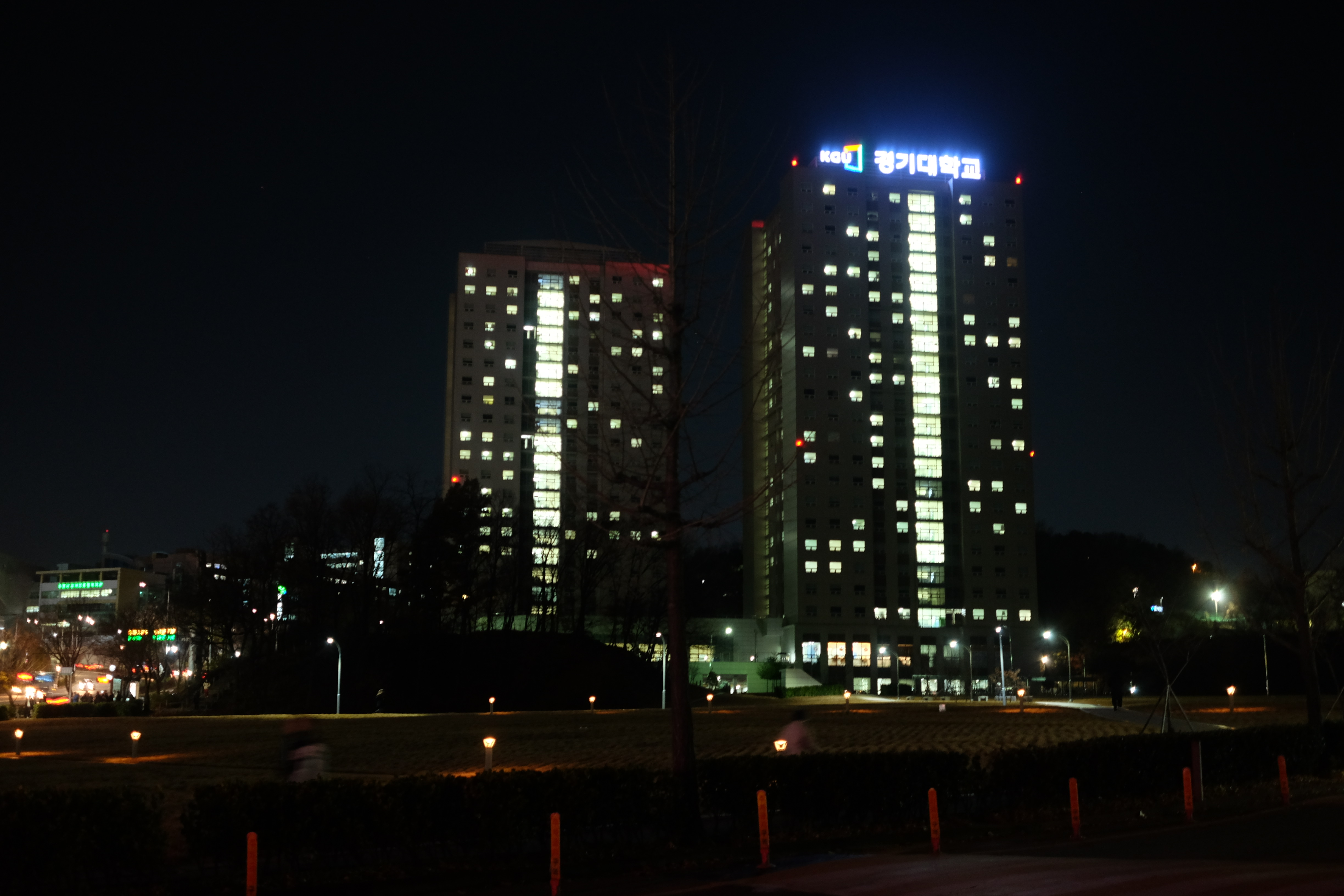 경기대학교 야경